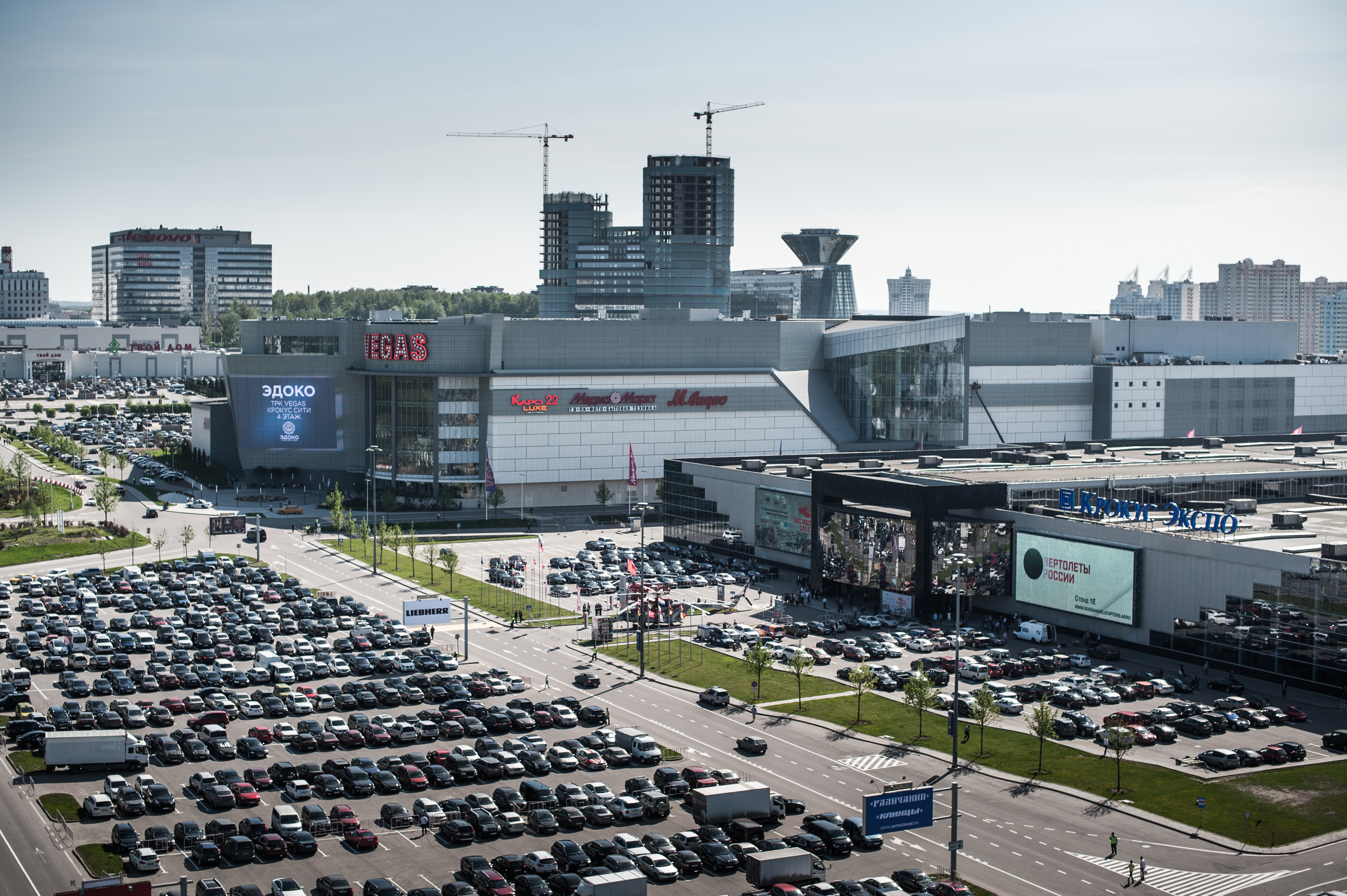 Международный выставочный центр «Крокус Экспо» – одна из самых крупных и современных выставочных площадок мира, член Всемирной ассоциации выставочной индустрии UFI в категориях «Организатор выставок» и «Выставочный центр».